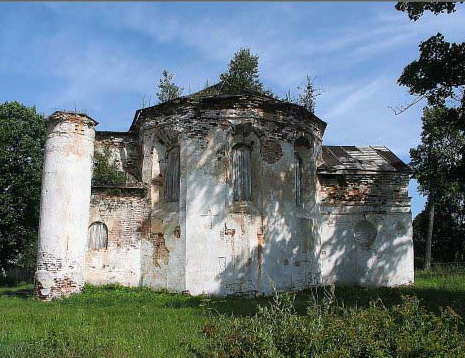 Кальвинистский сбор под Минском